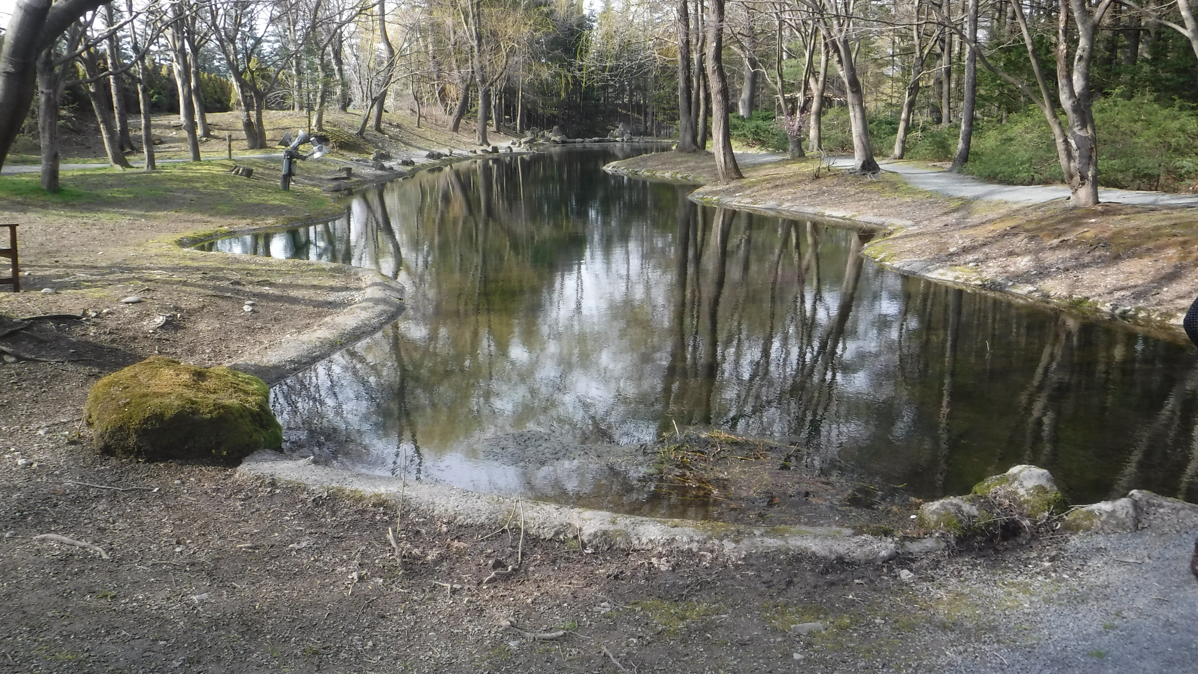 帯広市 真鍋農園の風景式庭園